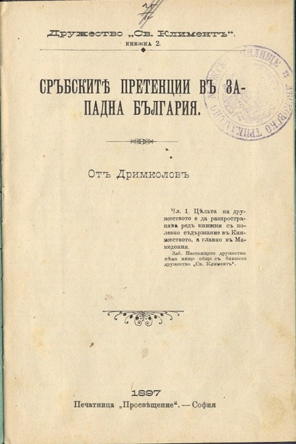 Корица на Сръбските претенции в Западна България на Христо Матов.